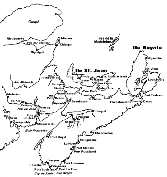 Acadia 1755